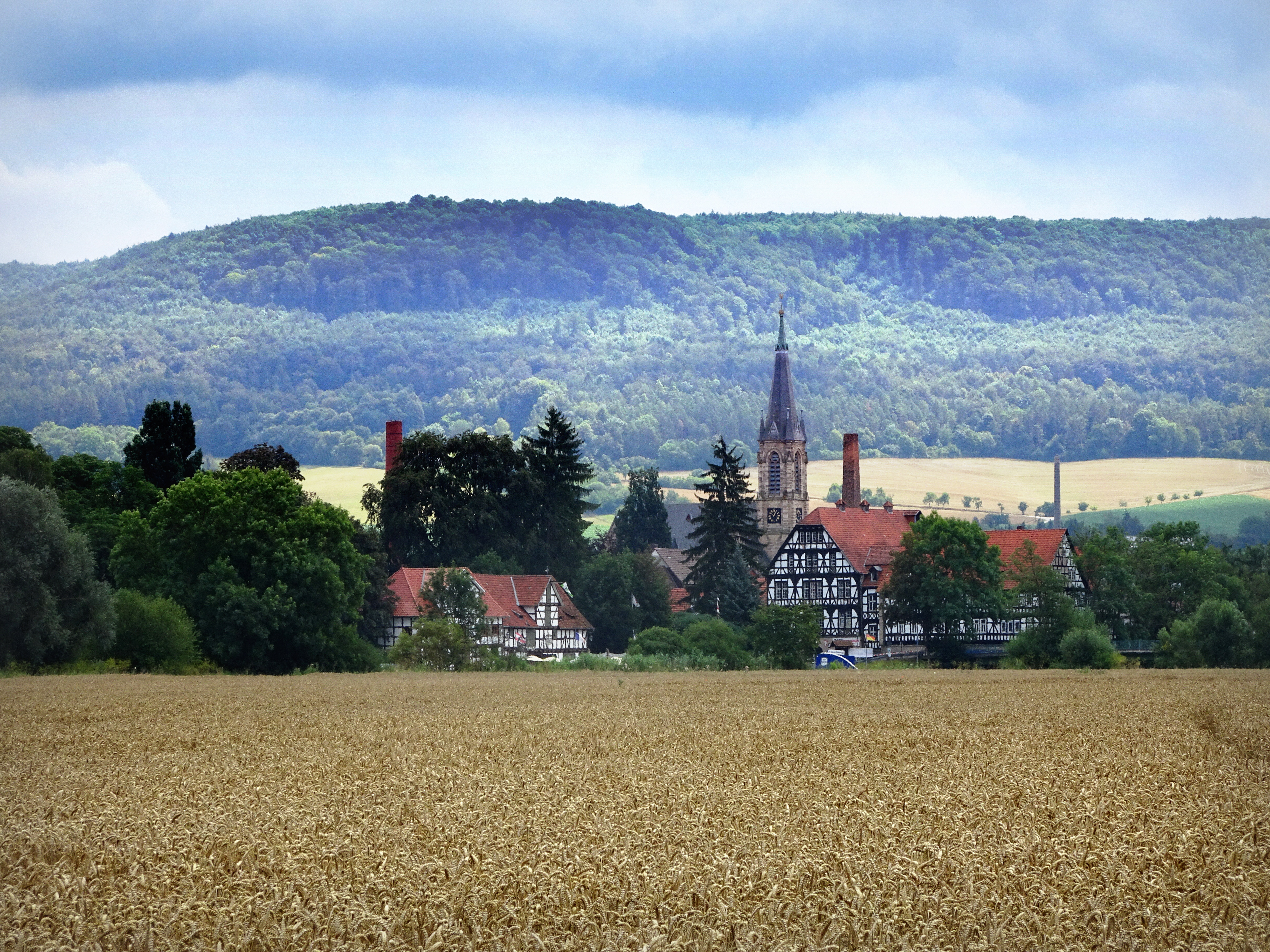 Wanfried im nordhessischen Werra-Meißner-Kreis. Blick vom Werratal-Radweg über die Werra auf die Stapelhäuser (links) und Lagerhäuser (rechts) der historischen Hafenanlage "Schlagd". In der Mitte der Turm der evangelischen Pfarrkirche. Im Hintergrund der Karnberg mit dem Leistersberg. Schon recht früh begann der Handel auf der Werra, belegt ist er seit Anfang des 12. Jahrhunderts. Als Endpunkt des Schifffahrtsweges wuchs Wanfried zu einem blühendem Zentrum, in dem Waren aller Art umgeschlagen wurden. Zunächst wählten Mühlhäuser Kaufleute Wanfried als günstigen Binnenhafen, später ließen auch Augsburger und Nürnberger Kaufleute und Kaufleute aus anderen Regionen, von oder bis nach Wanfried ihre Waren auf dem Landweg transportieren. Mit dem Siegeszug der Eisenbahn schwand Wanfrieds Bedeutung als Umschlaghafen immer mehr. Nach dem Verkauf der Schlagdhäuser in 1860 endete die „gute alte Zeit“, die Wanfrieds Wohlstand begründet hatte. Details Flur 34, Flurstück 8/7, 139/2